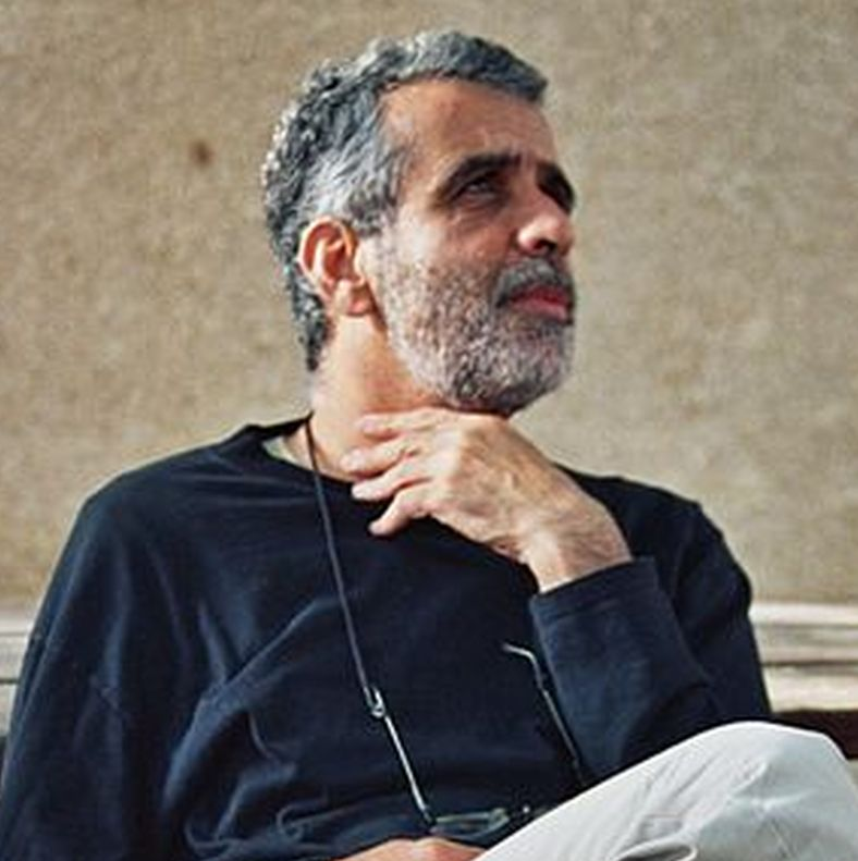 archeologist Israël Finkelstein in 2007